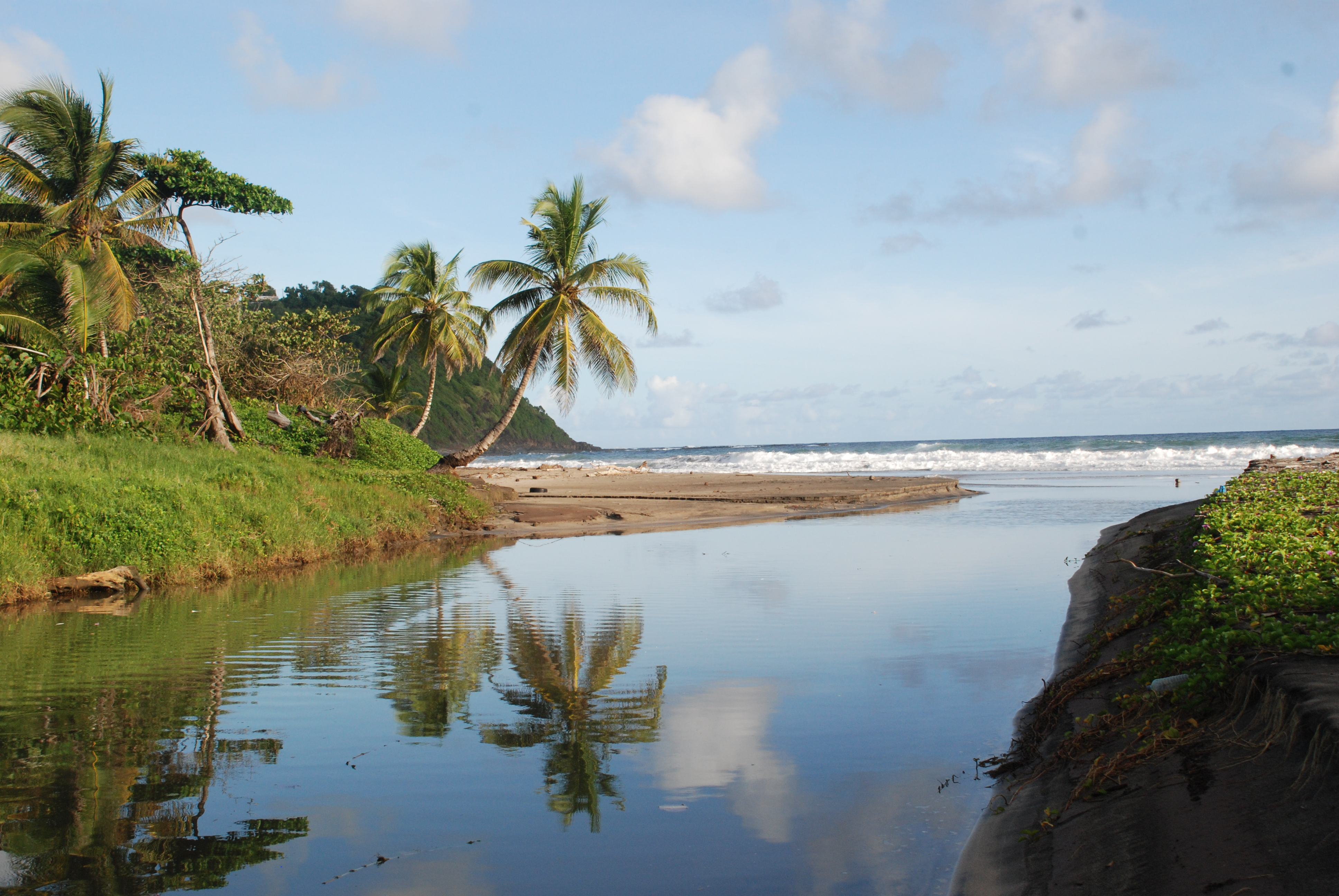 L’Anse Charpentier ou Anse du Charpentier du nom de l’habitation sucrière dont elle porte le nom, se situe le long de la côte atlantique entre les villes de Sainte-Marie et de Marigot à la Martinique. Spot prisé des surfeurs, la baignade n’est pas conseillée en raison des forts courants. En revanche ce site aménagé offre un cadre naturel exceptionnel pour le pique-nique ou autres moments de détente.